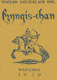 okładka książki z 1939 r.